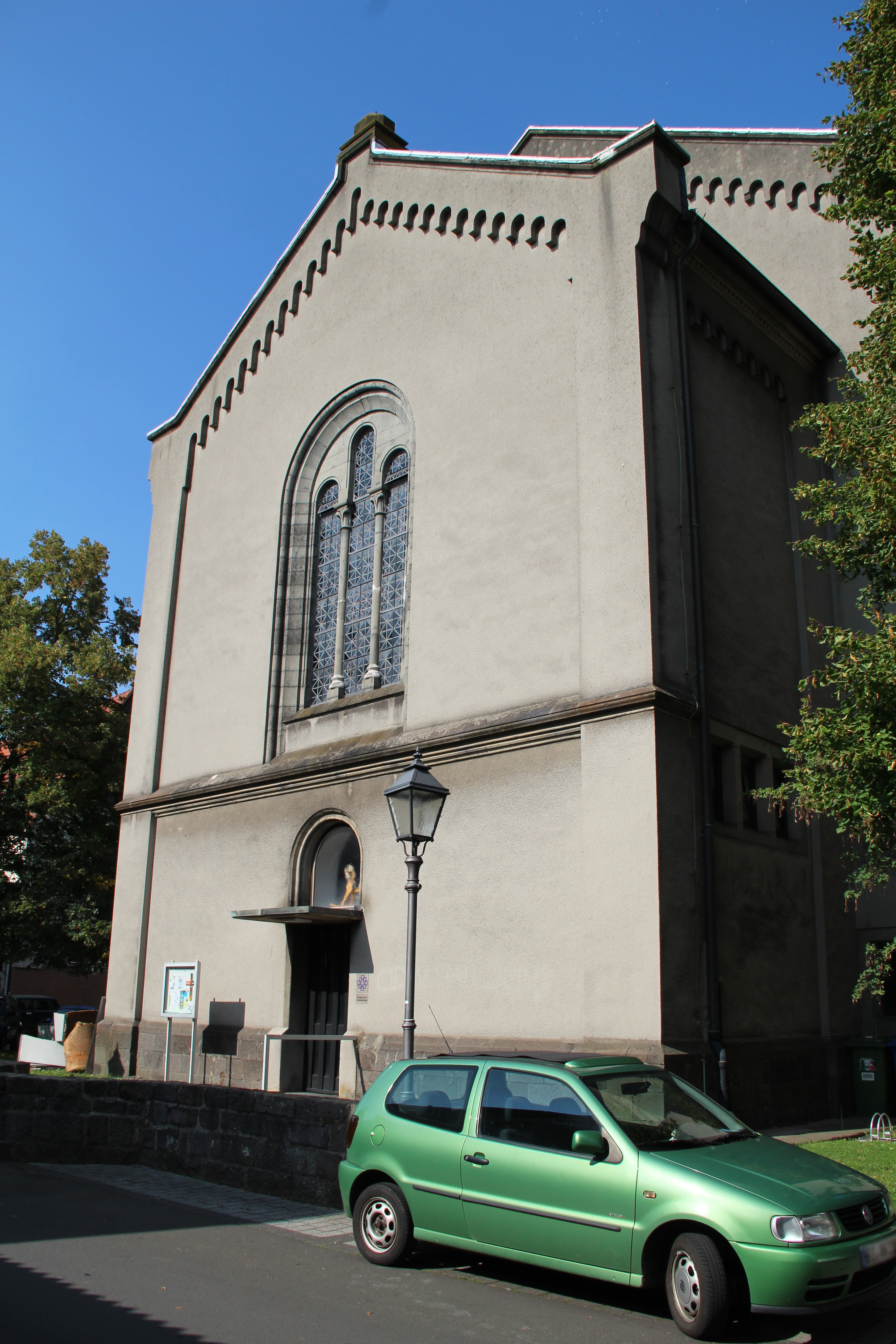 Ev. Kirche